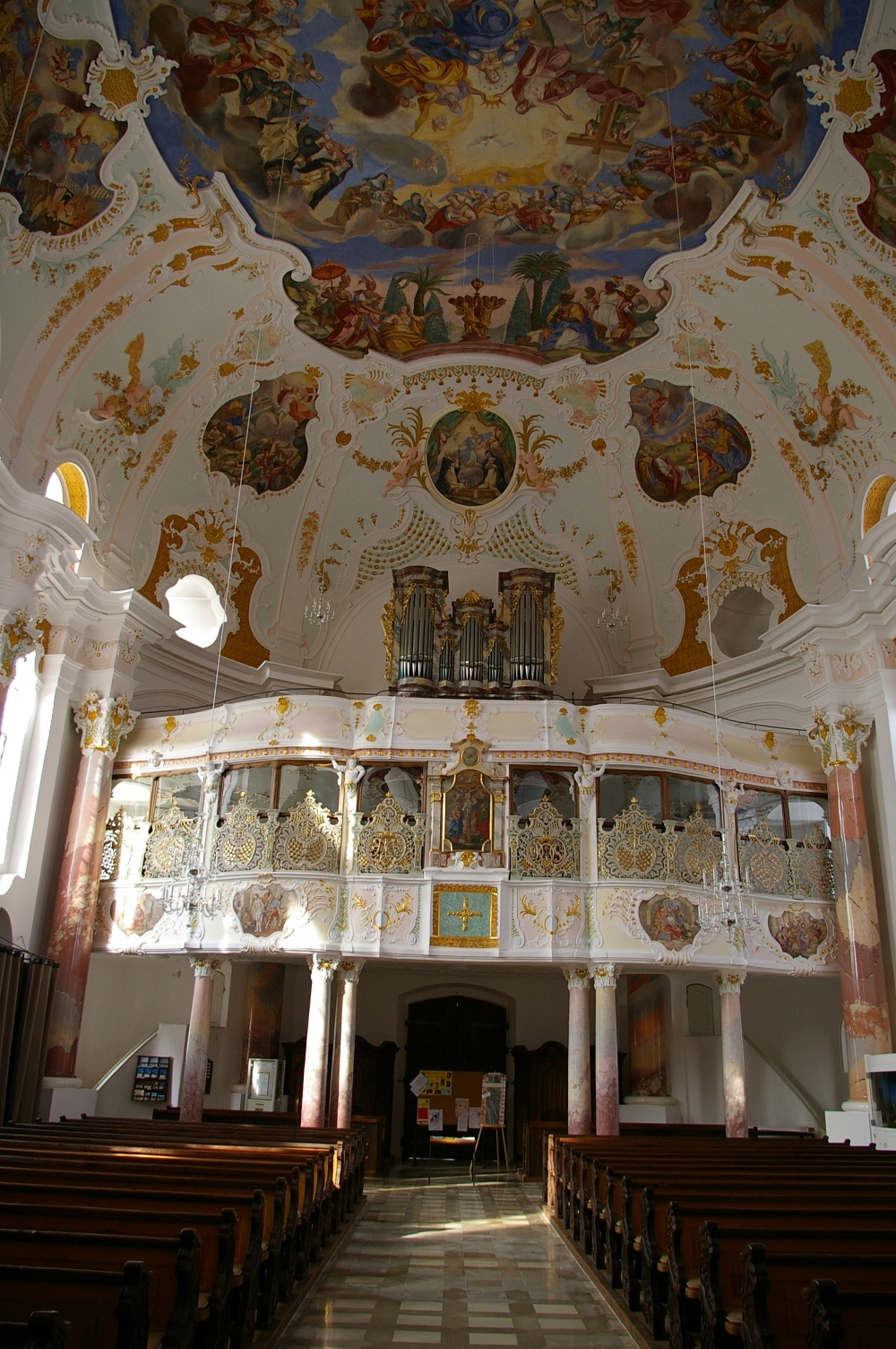 Günzburg, Decke und Chor/Orgel der Frauenkirche.